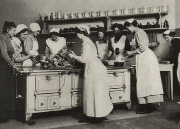 Elise Hannemann beim Unterricht im Lette-Verein um 1910 aus: Der Lette-Verein und seine Unterrichtsanstalten, Berlin Lette-Verein 1912